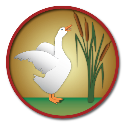 Lo stemma della Contrada San Cassiano